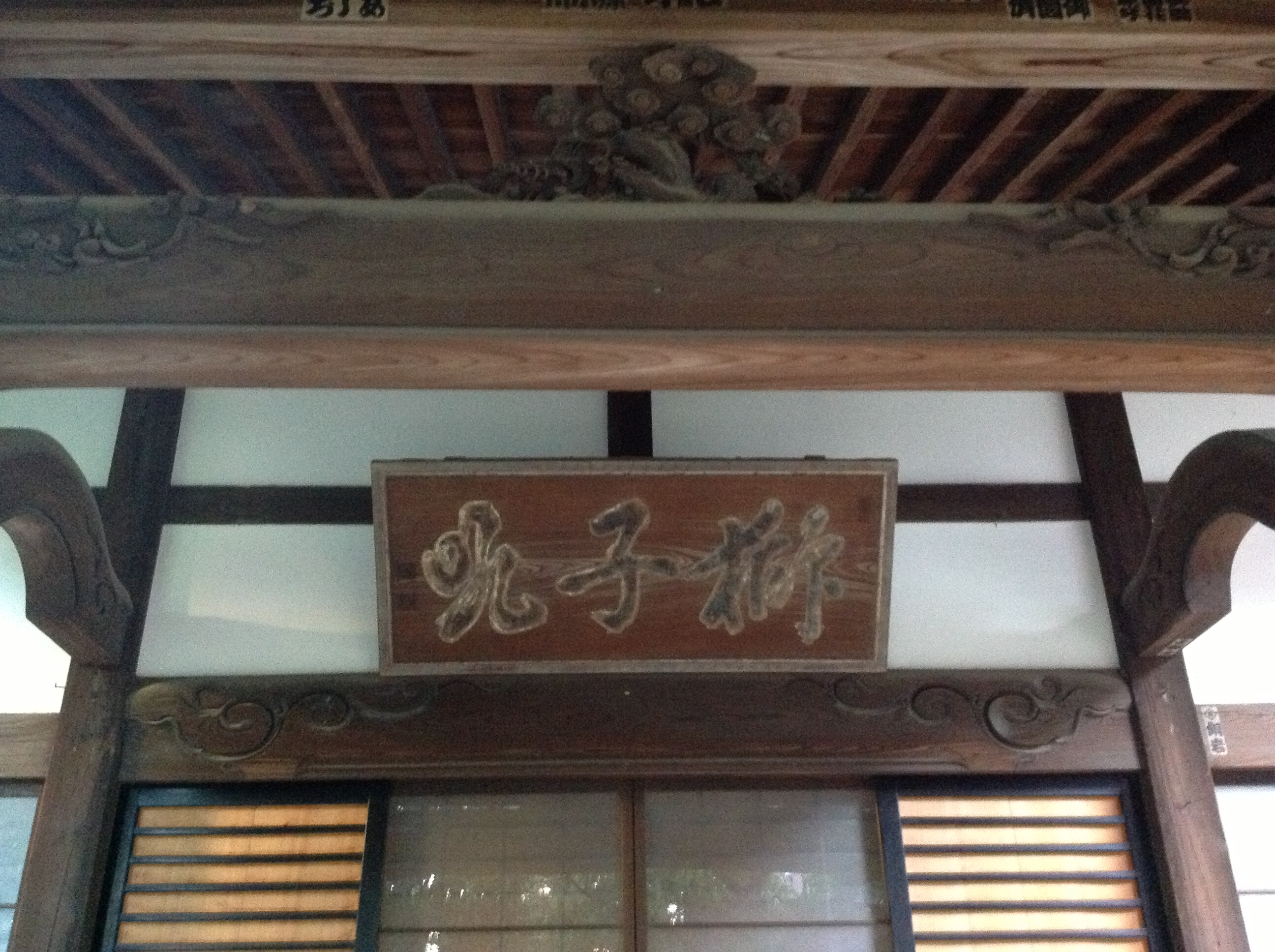 本堂の正面に上げられた「獅子吼」の額（平成25年9月9日）